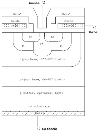 en esta imagen se muestra la sección transversal de un tiristor controlado por mosfet donde se aprecian las diferentes capas de material semiconductor dopado